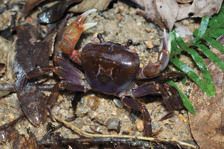 Nanhaipotamon macau sp. n., male (29.0 × 24.2 mm), SYSBM 001654